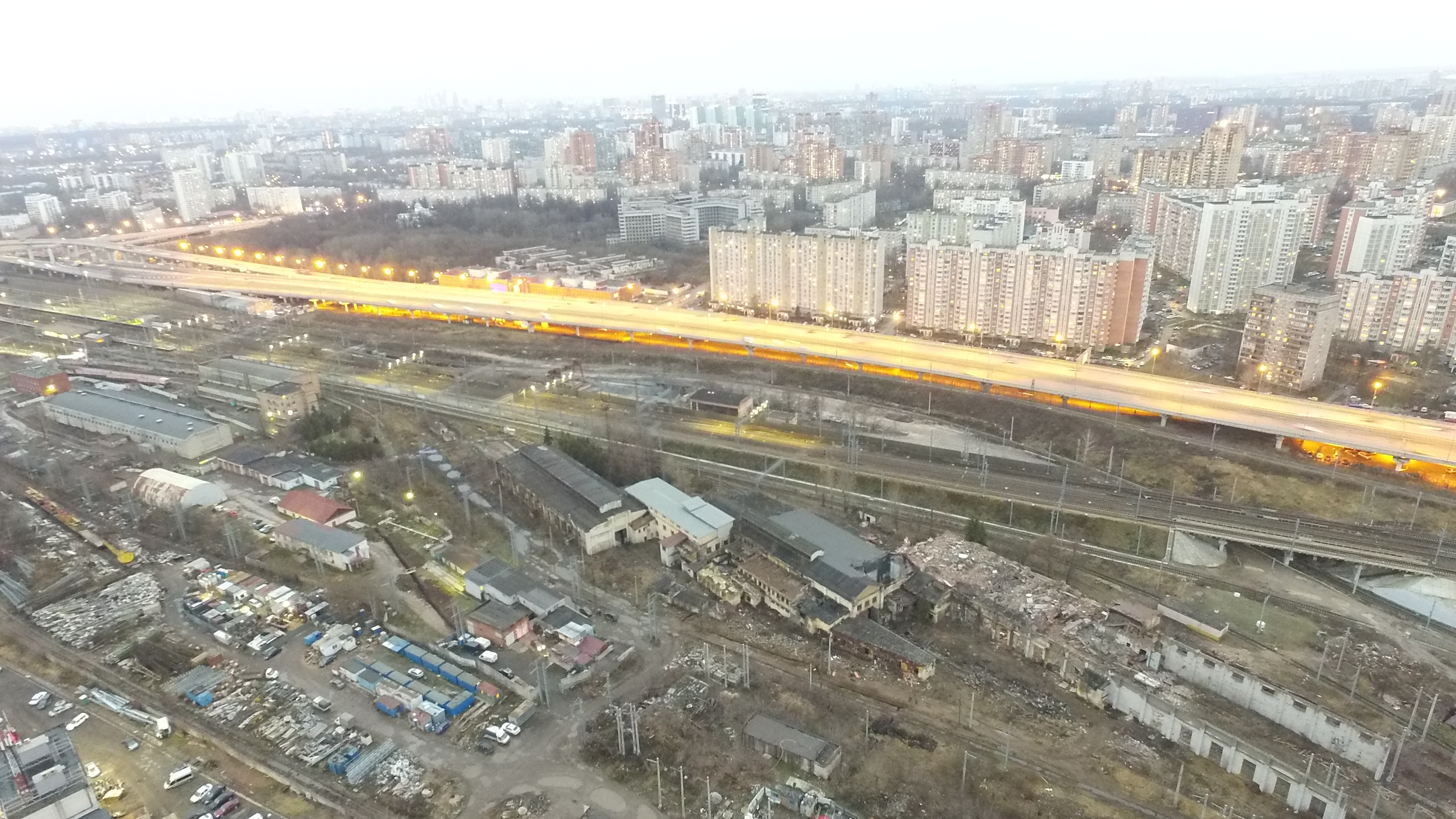 DCIM\102MEDIA\DJI_0163.JPG